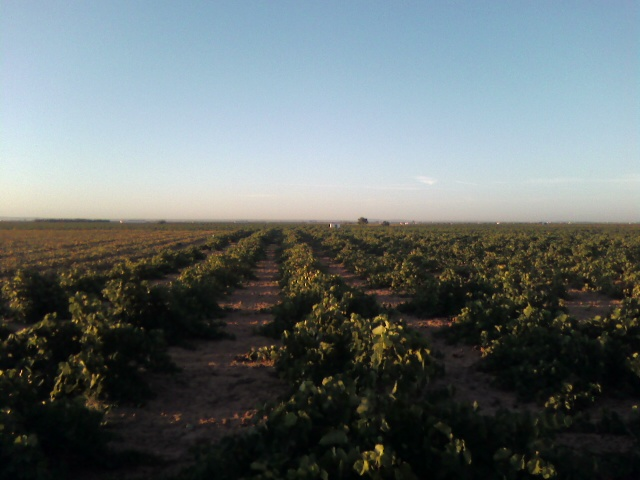 Viña en Arenales de San Gregorio.